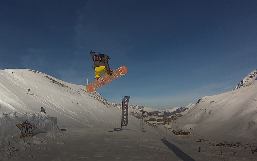 Gidaria Method izeneko estilo askeko akrobazia egiten Les deux alpes-tan, Frantzian